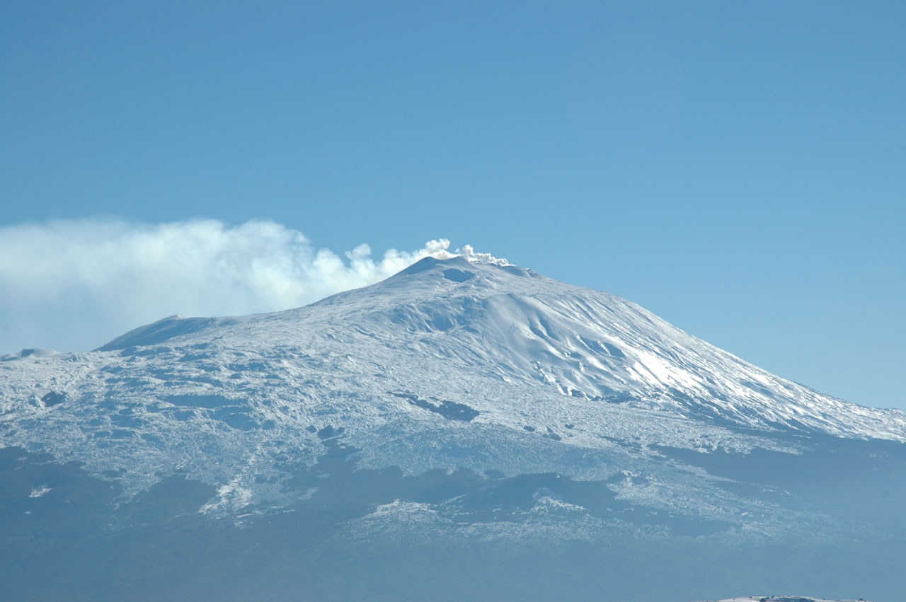 L'Etna visto da Belpasso.